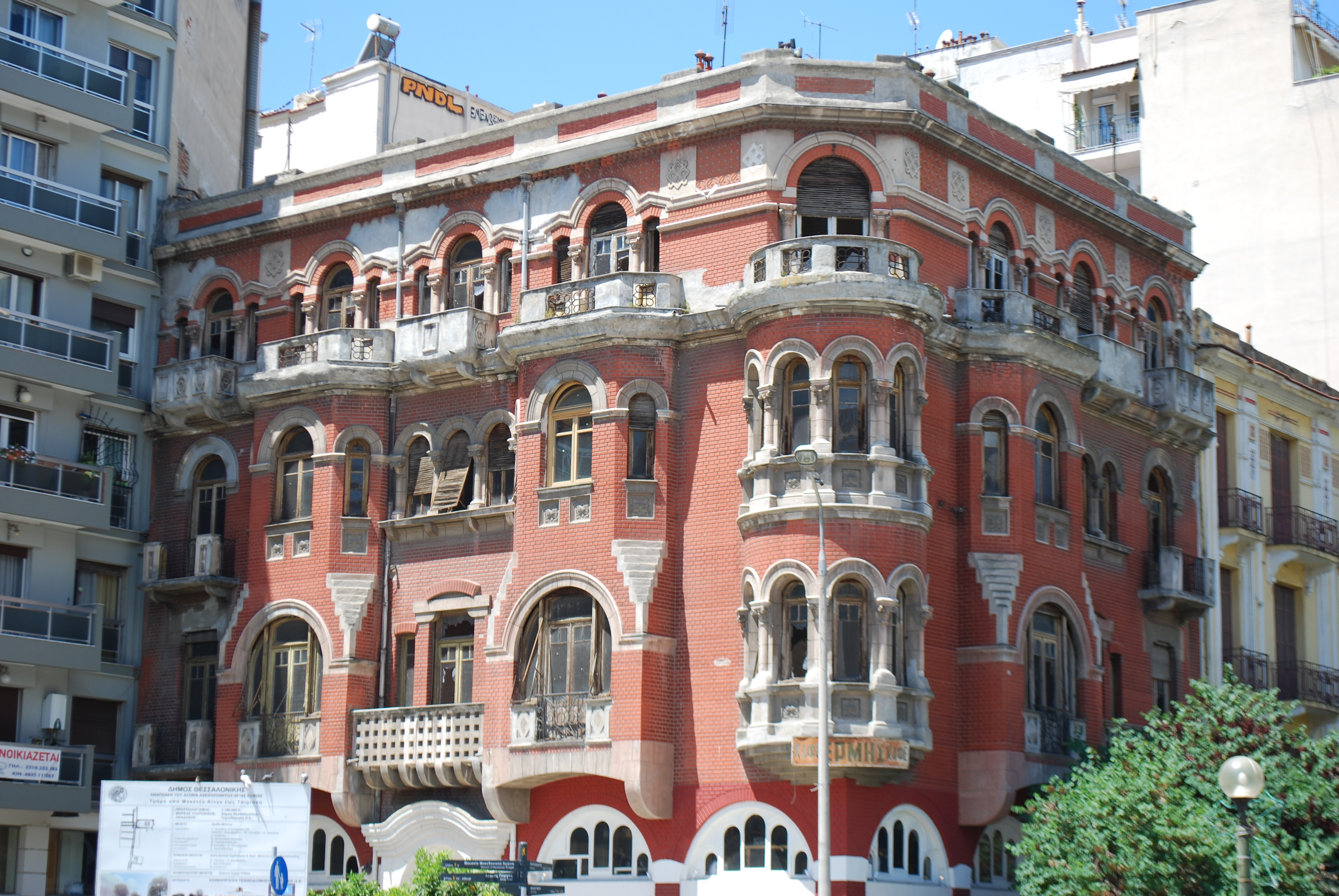 Vue de Thessalonique.